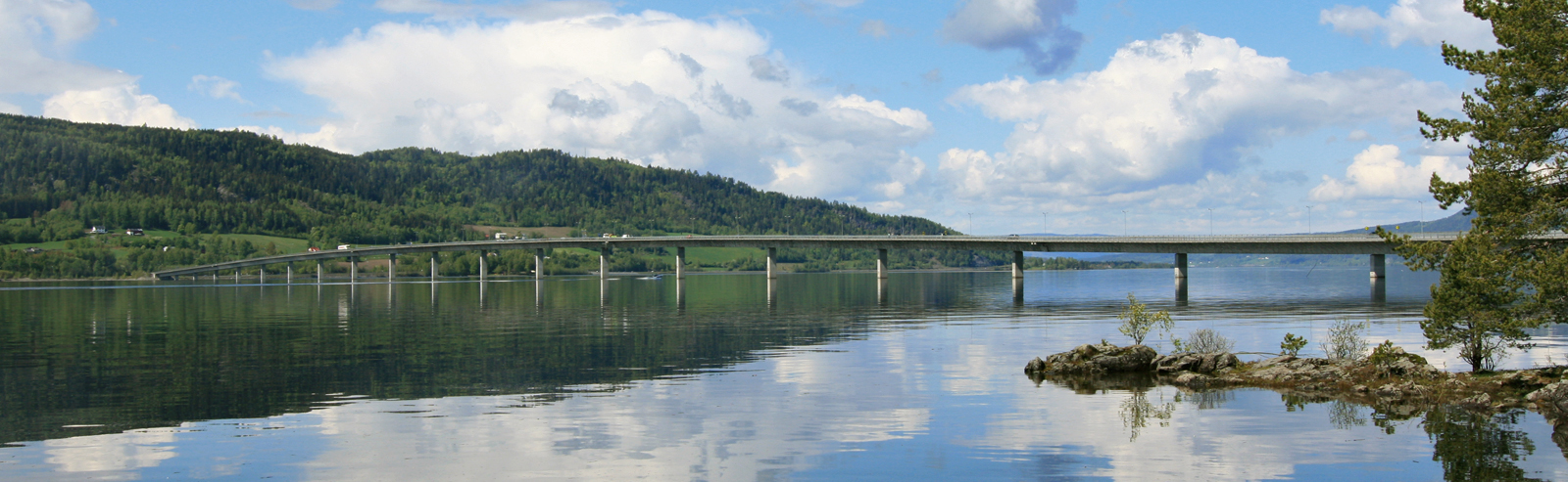 Mjøsbrua, Hedmark and Oppland, Norway